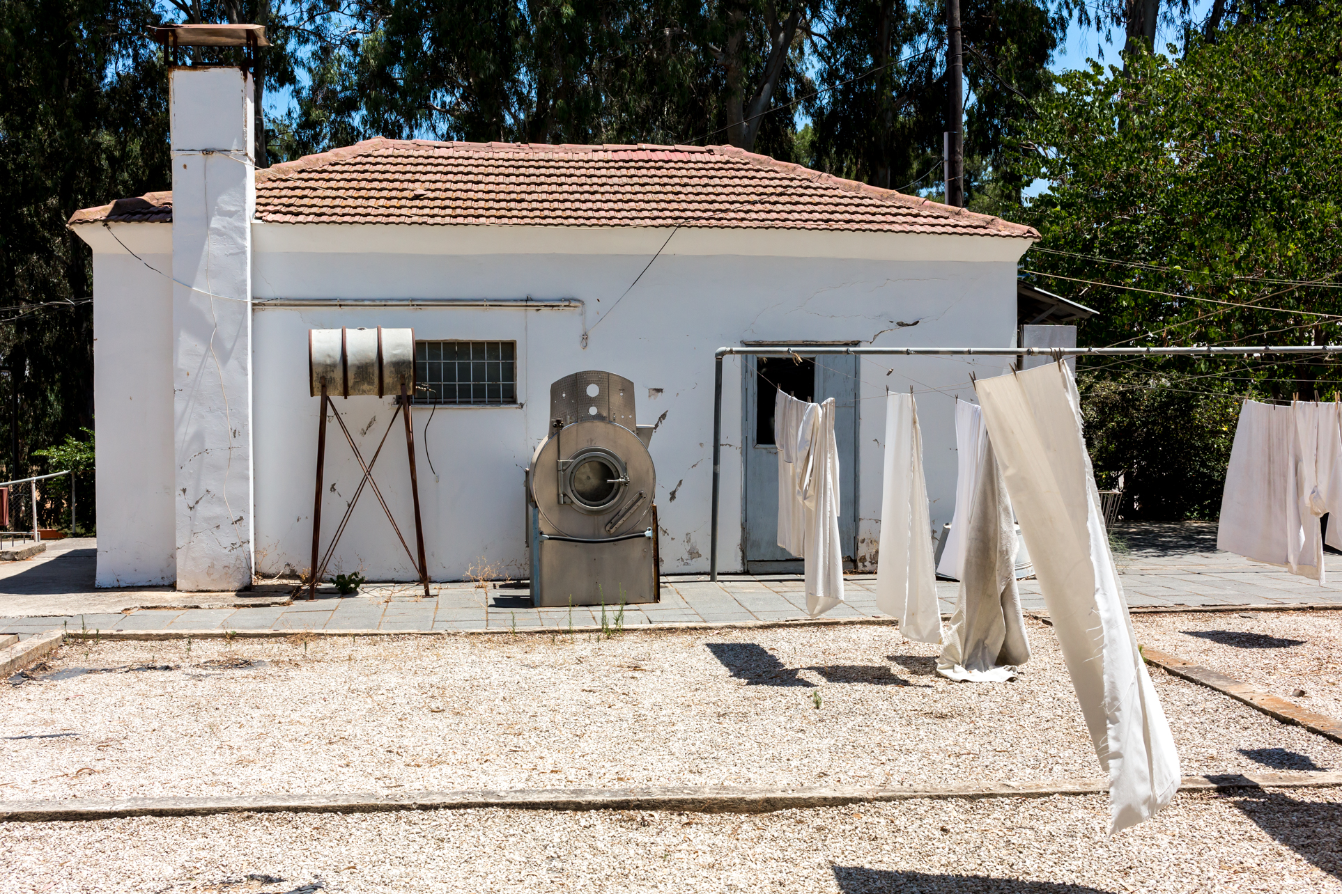 מכון איילון היה סליק ומפעל מחתרתי לייצור קליעים של ארגון ההגנה בגבעת הקיבוצים, השוכנת במבואותיה הצפוניים של העיר רחובות, בתקופת המנדט הבריטי.